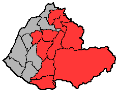 苗栗第二選舉區